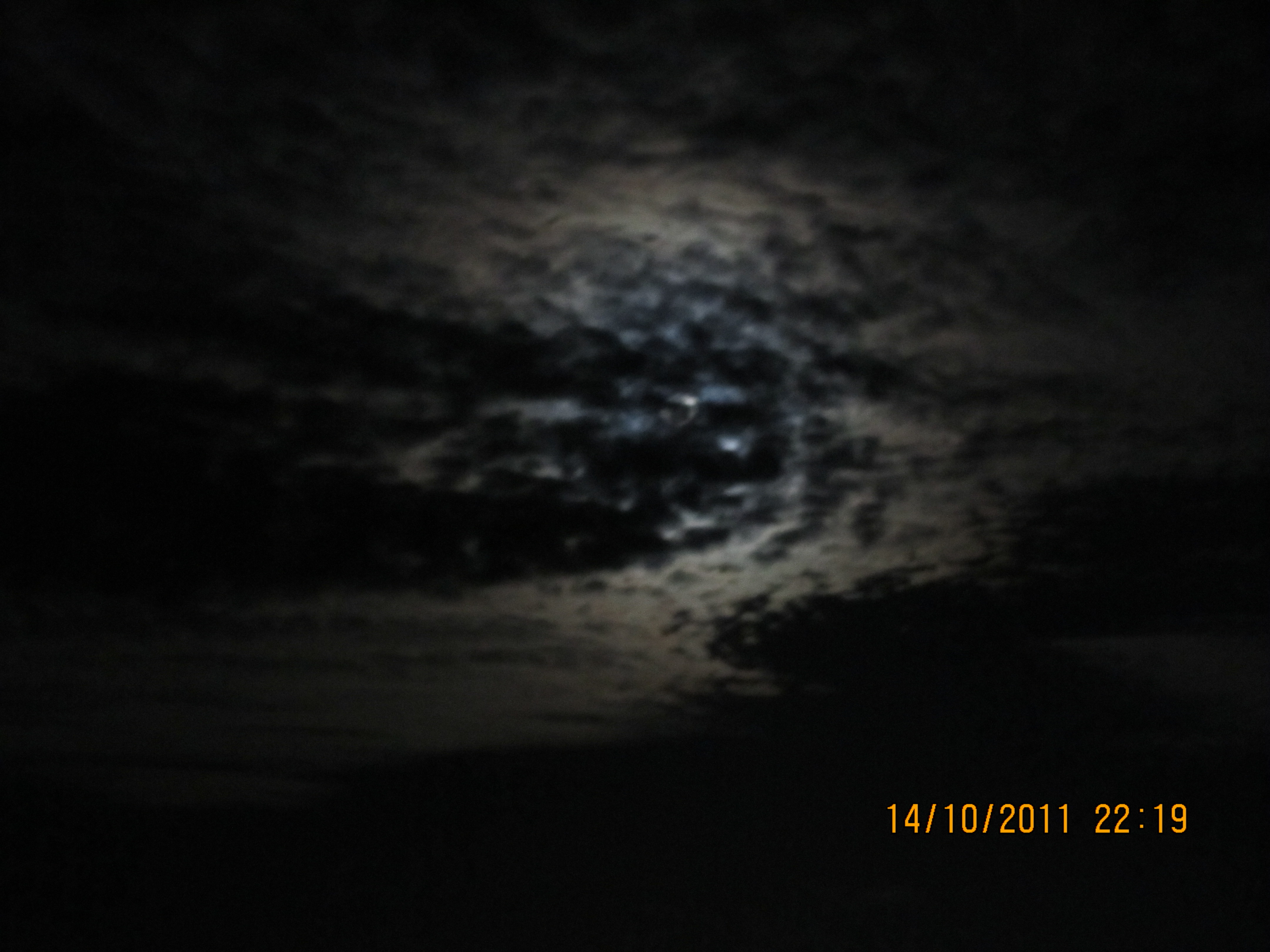 Moon behind night clouds from Victoria Australia